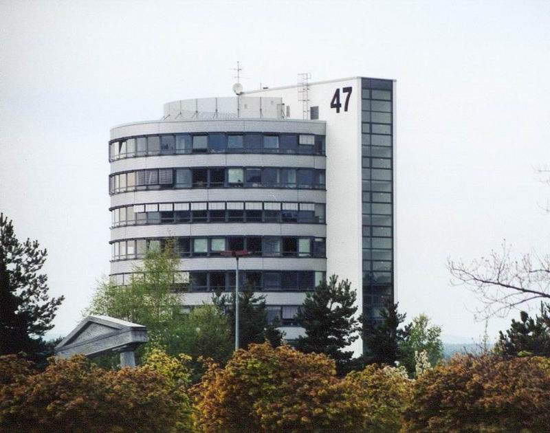 Verwaltungsgebäude der Uni KL, GNU FDL